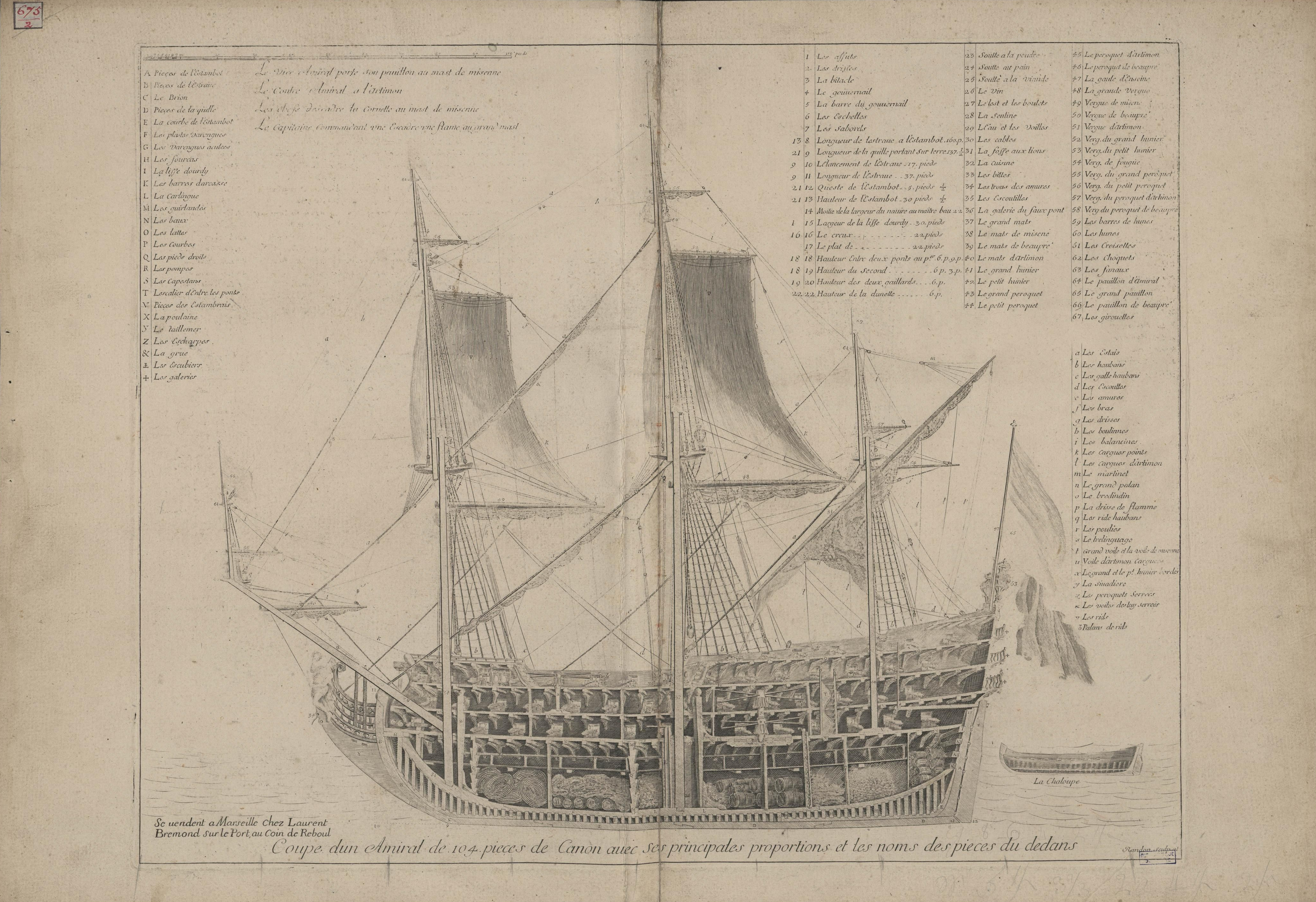 Coupe d'un amiral de 104 pieces de Canon avec Ses principales proportions et les noms des pieces du dedans. Se vendent à Marseille : Chez Laurent Bremond, [16..] ; 1 grav. en taille douce ; 47,5 x 71 cm